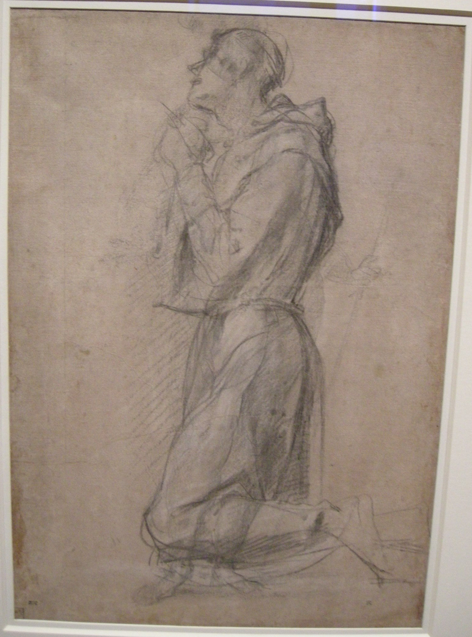 Pontormo, san francesco per la pala di san michelino visdomini, 1517-18